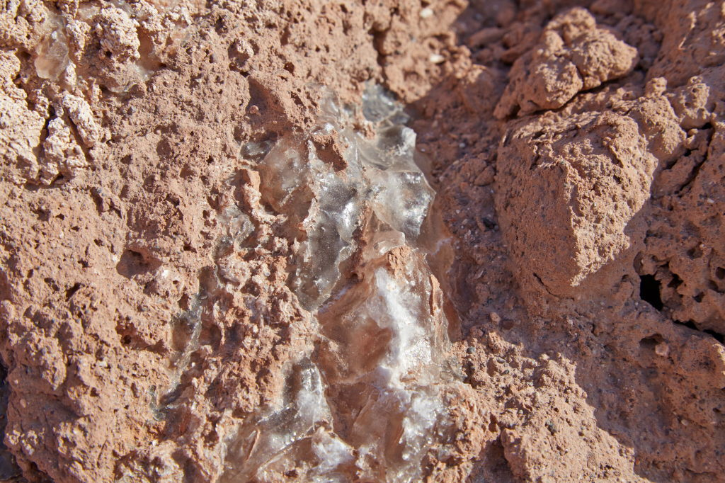 Valle de la Luna i San Pedro de Atacama.